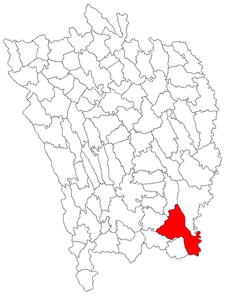 Categorie:Hărţi ale judeţului Vaslui